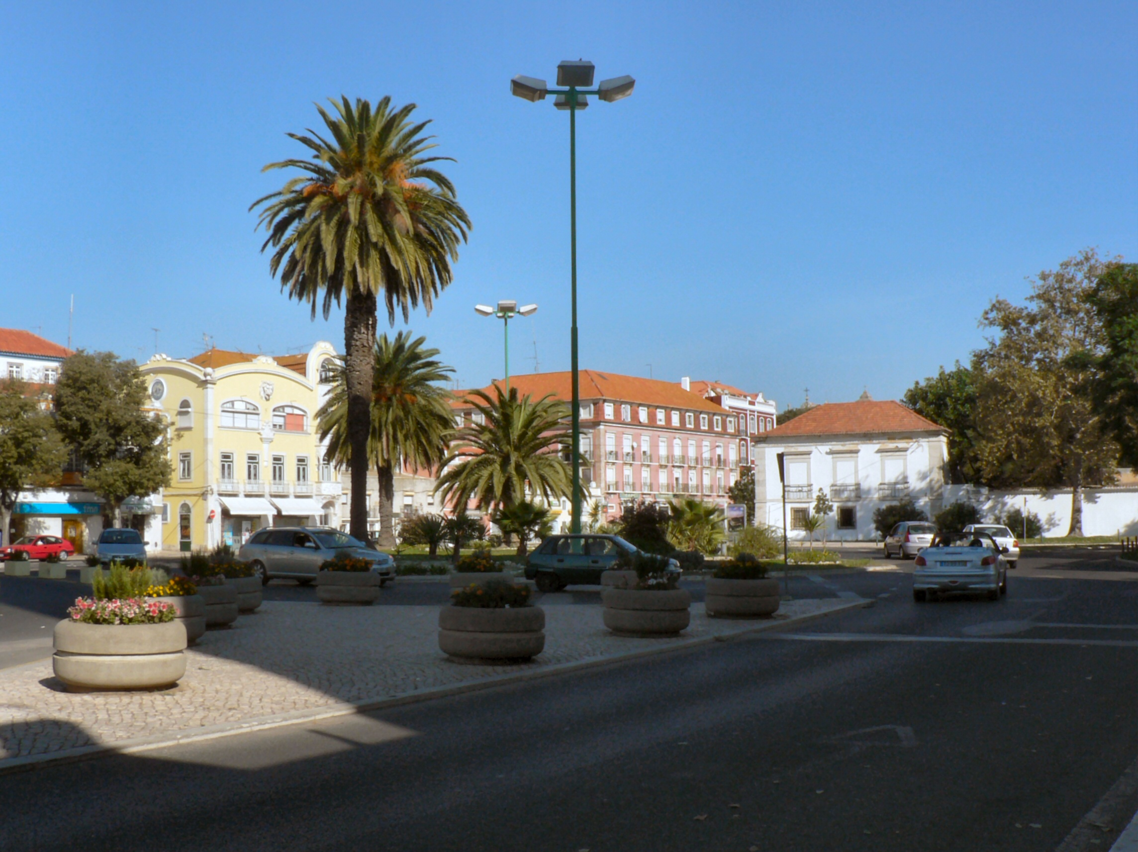 Vista da Avenida Luísa Todi, Setúbal, Portugal